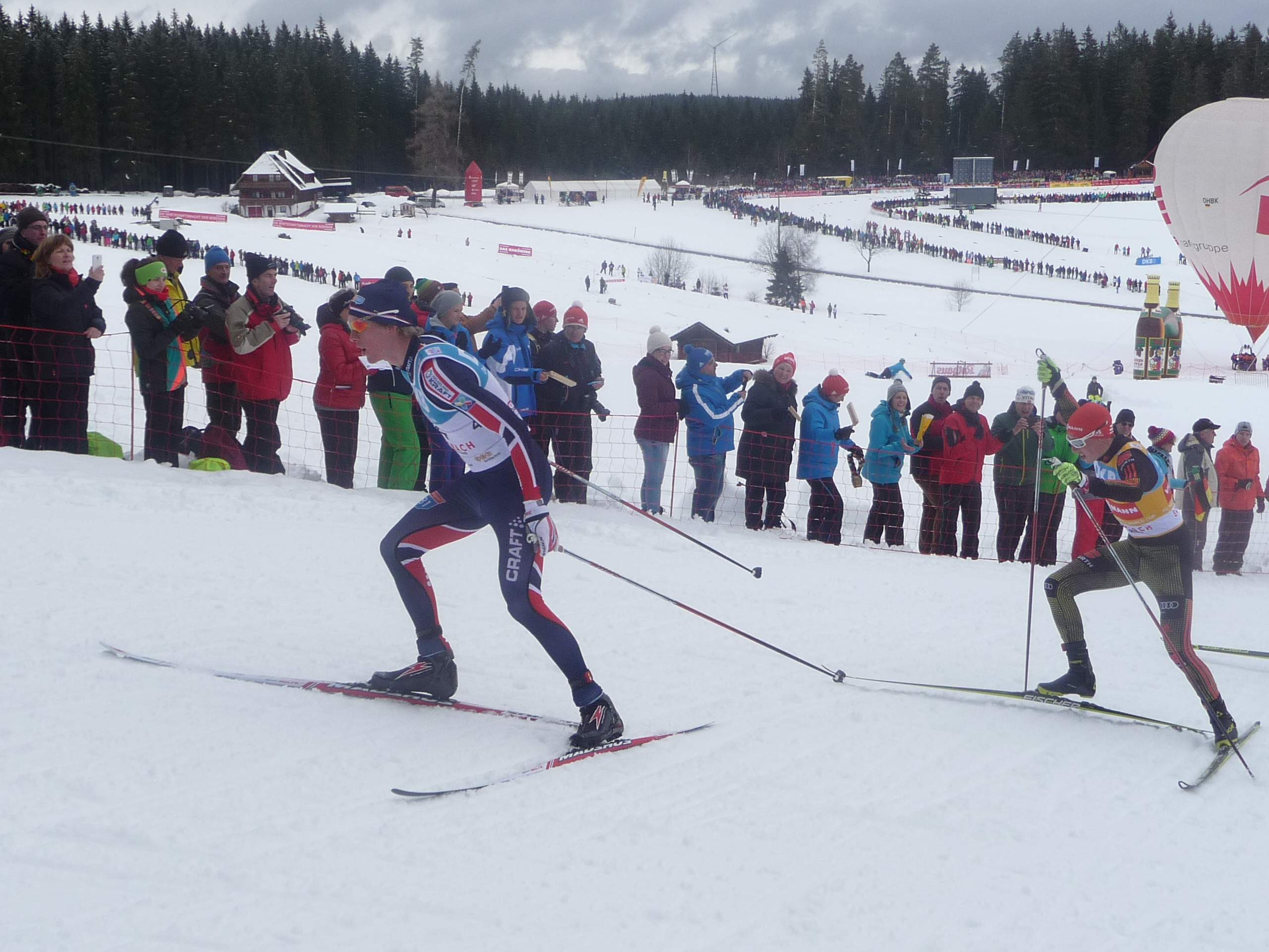 Weltcup Nordische Kombination 5. März 2016 in Schonach: Magnus Krog (NOR) und Eric Frenzel (GER)